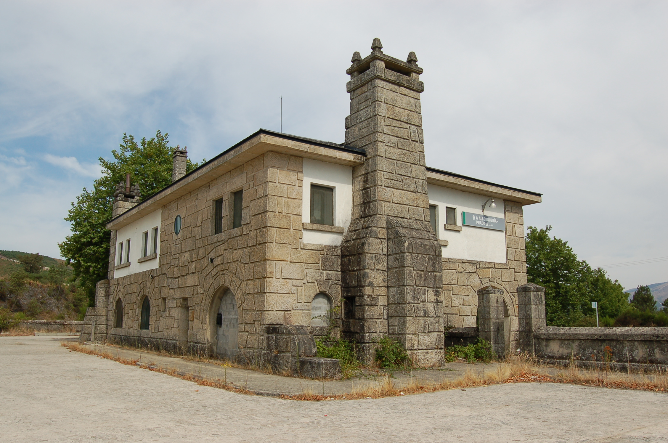 Estación de ferrocarril da Alberguería - Prado